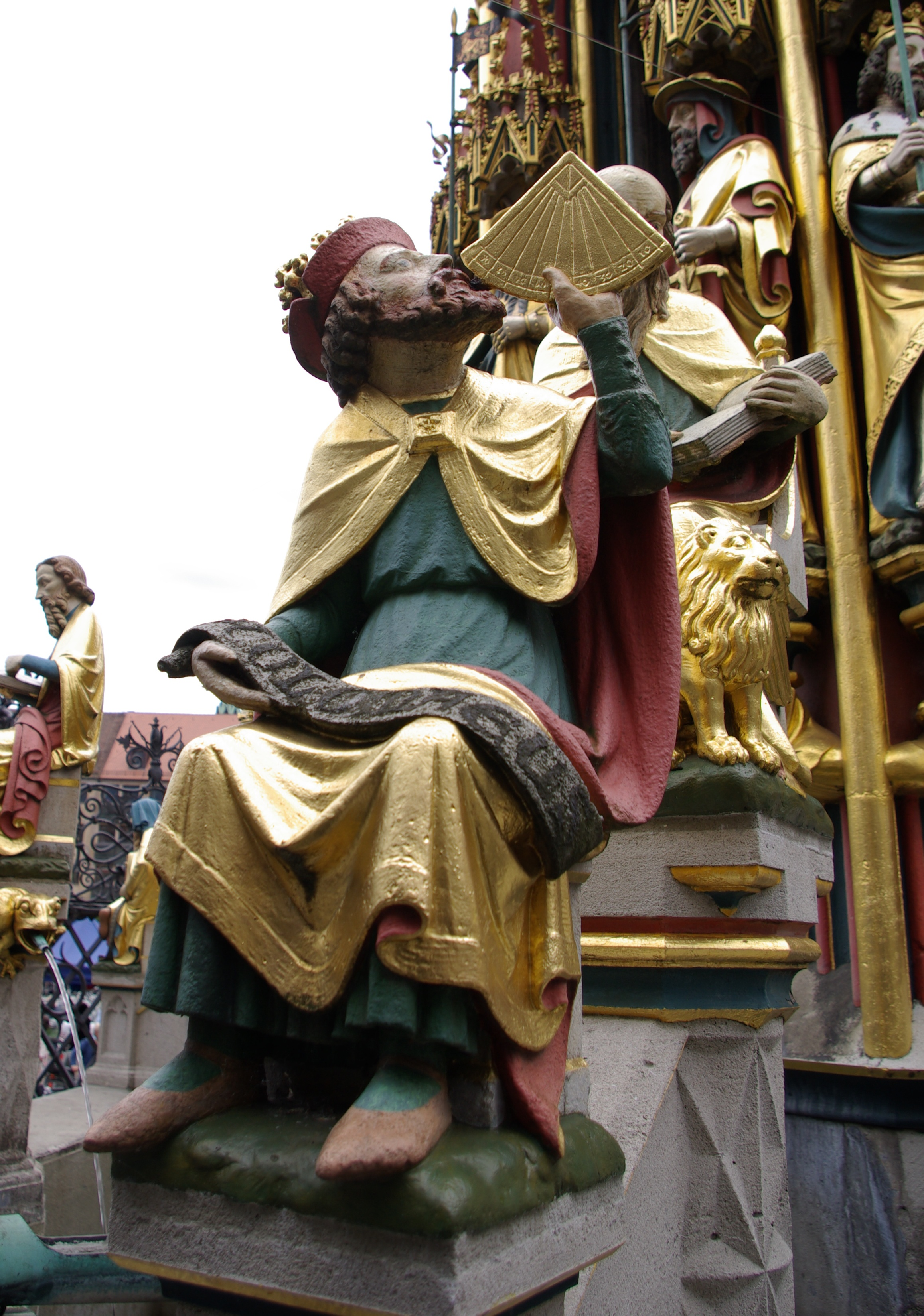 Nürnberg. Hauptmarkt mit Schönem Brunnen. Skulpturen: Ptolemäus als Symbol für die Astronomie und dahinter der Evangelist Markus.